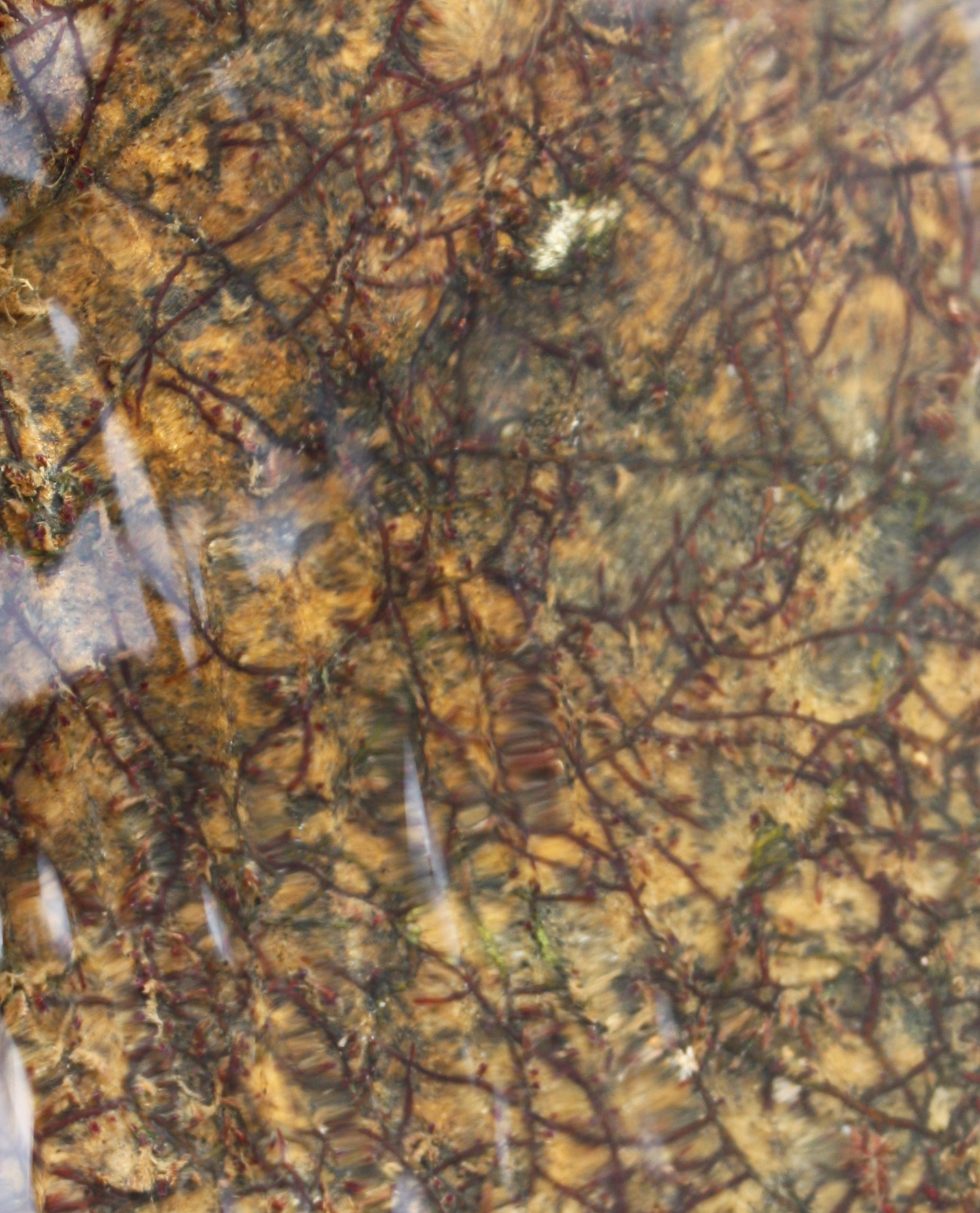 Tristicha trifaria in Cascades de Karfiguela, SW Burkina Faso